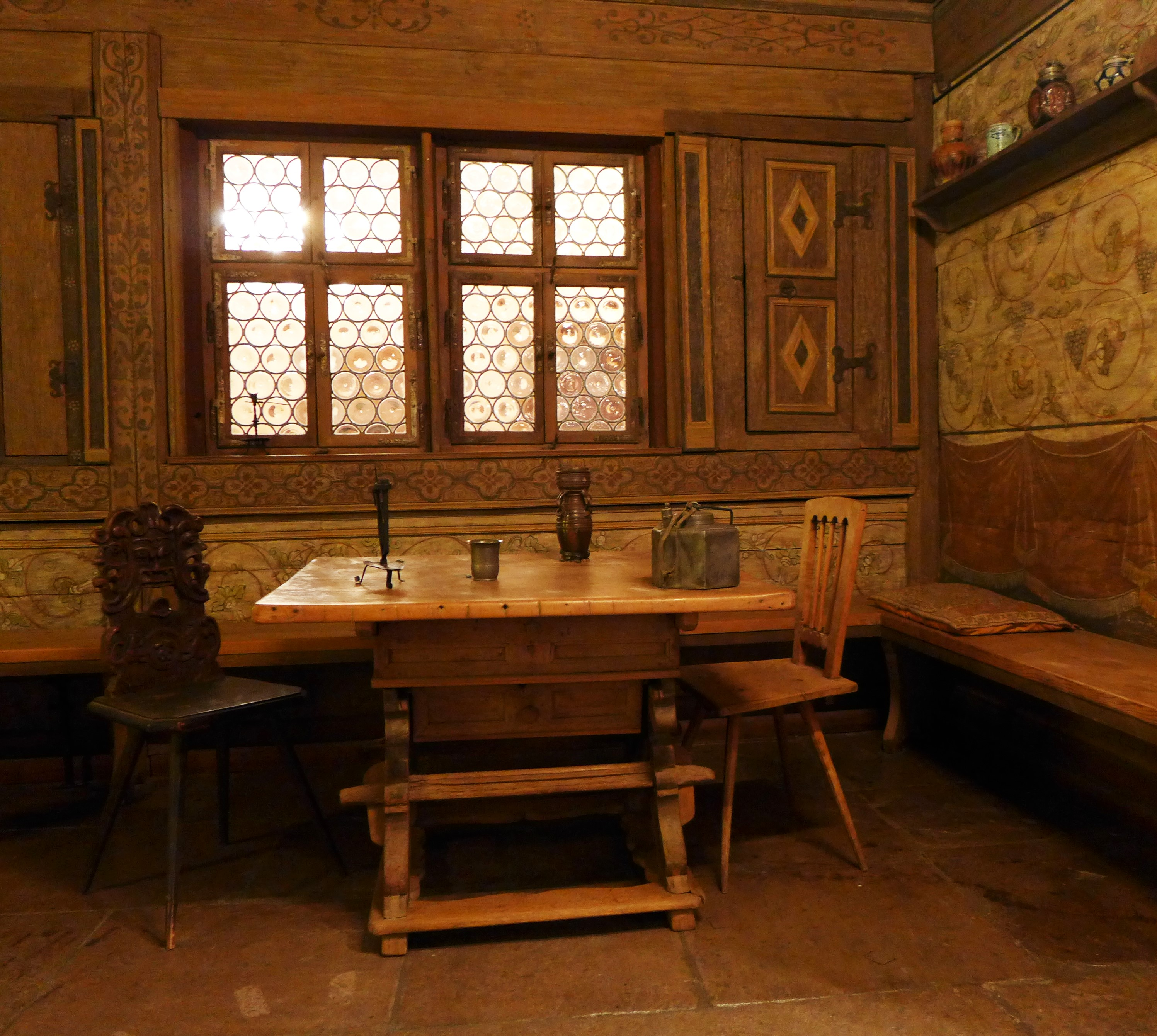 Jogltisch in einer Winzerstube vom Ende des 16. Jahrhunderts aus Sulzfeld im Landkreis Kitzingen, Bemalung der Wandvertäfelung im Renaissance-Stil (Mainfränkisches Museum Würzburg, Volkskundliche Abteilung)